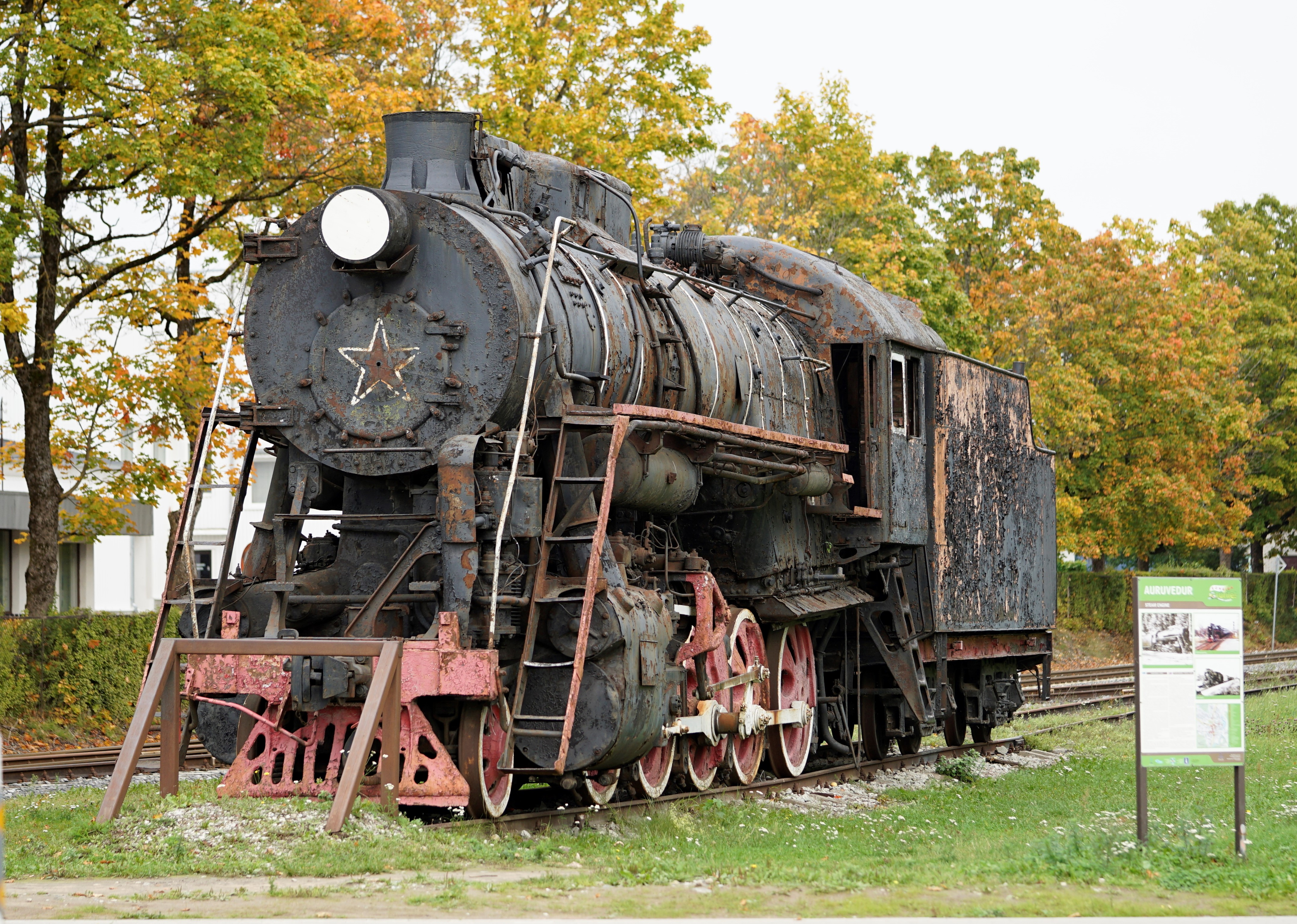 Monument Train in Türi